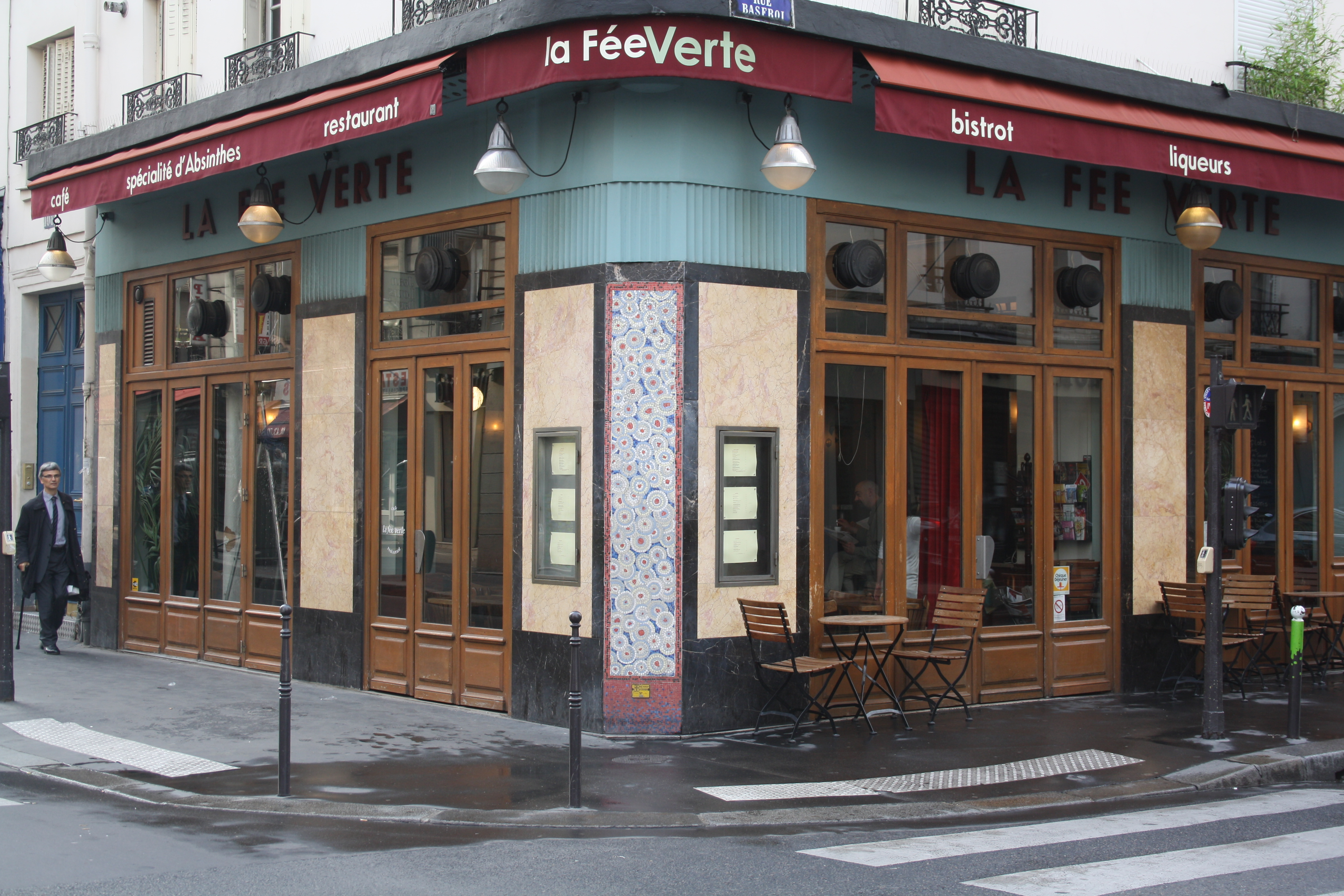 La Fée Verte, 108 Rue de la Roquette, 75011 Paris, France.